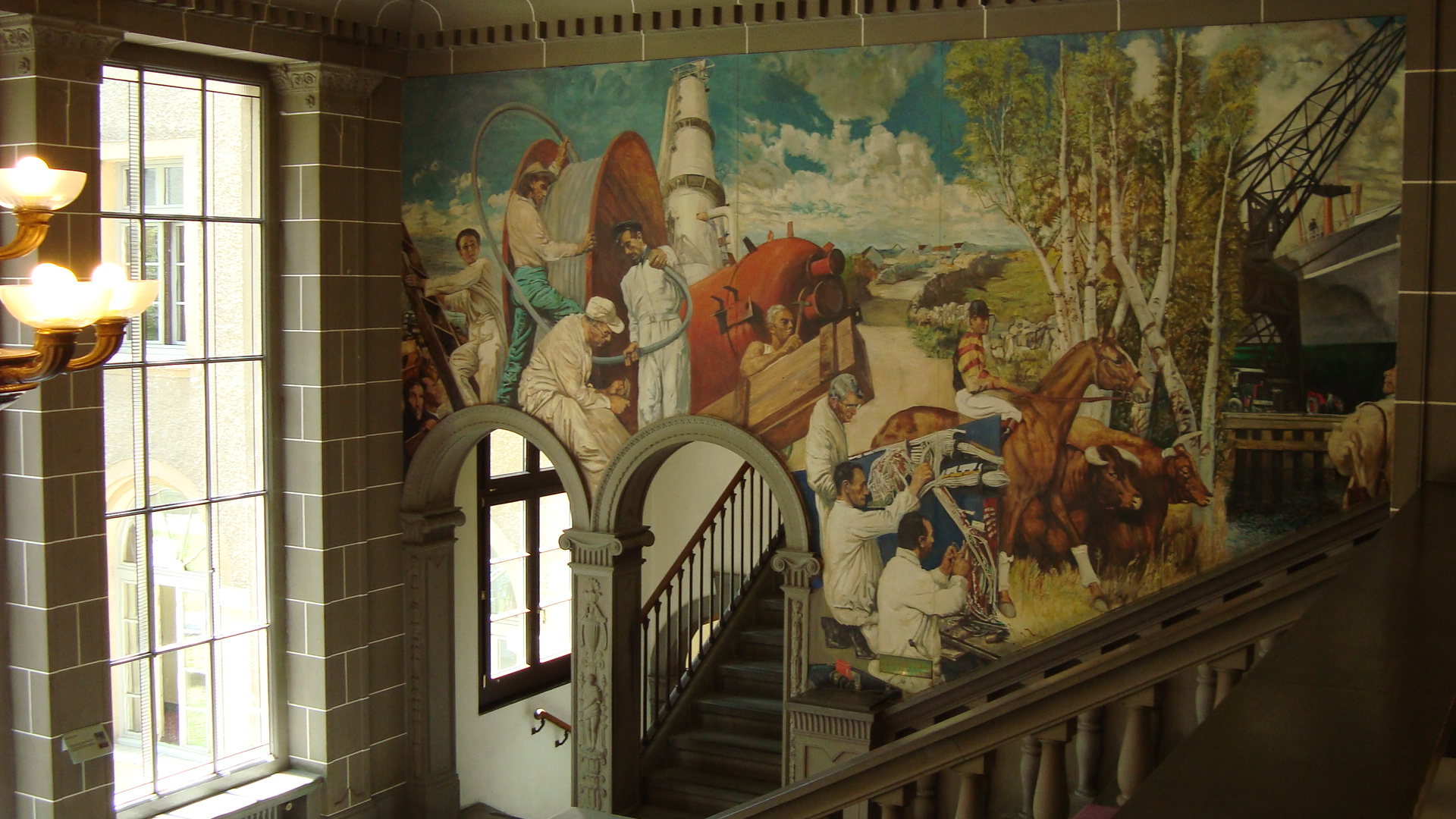 Oeuvre de Sean Keating (1961) représentant le travail et l'industrie. Don du gouvernement de l'Irlande. Intérieur OMC (anciemment BIT)